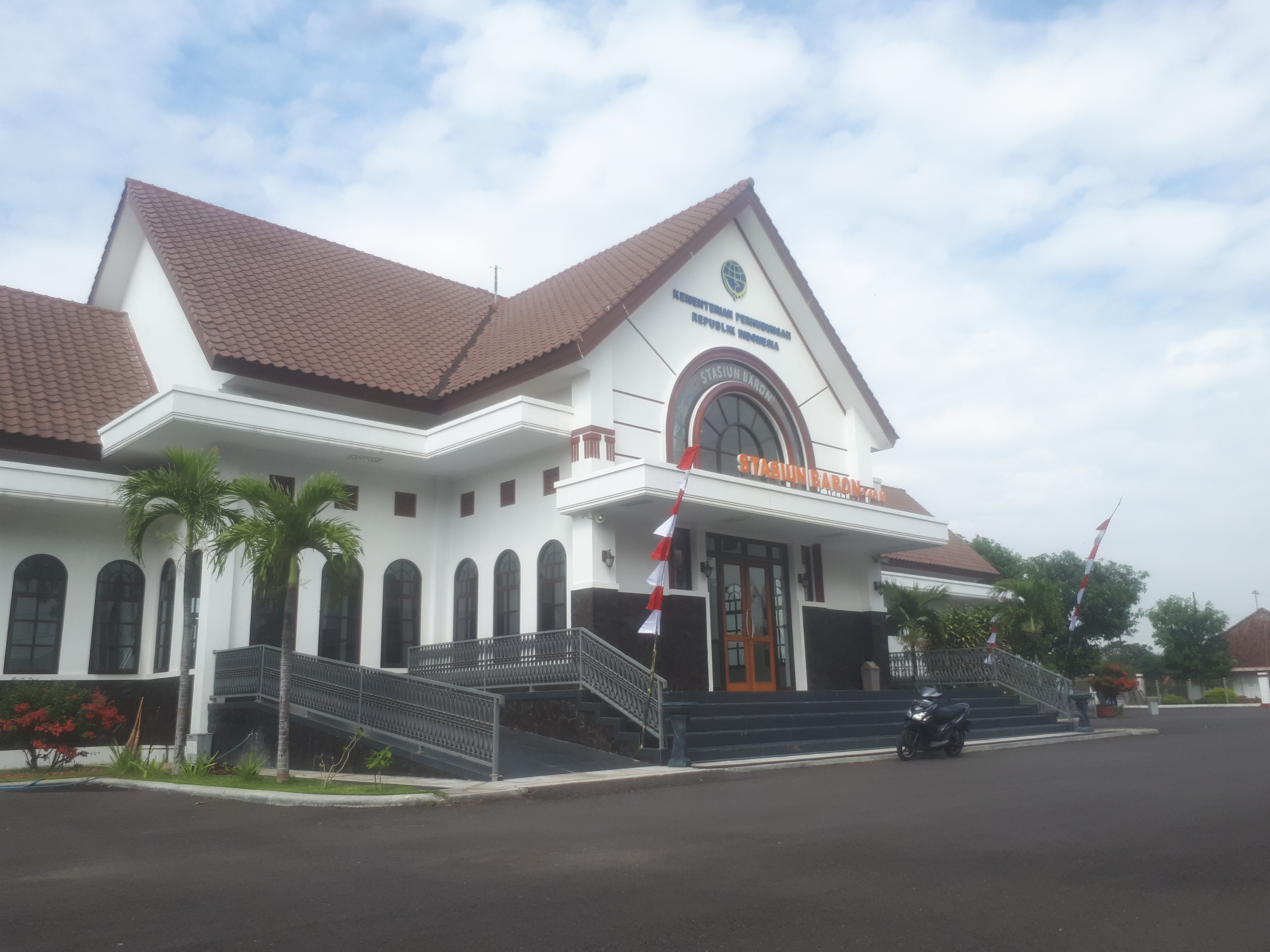 Tampak luar Stasiun Baron dari sisi utara. Stasiun ini terletak di Kabupaten Nganjuk, Jawa Timur, 2020